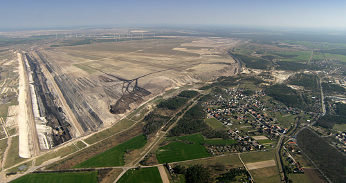 Der Tagebau Cottbus-Nord (zukünftiger Ostsee) aus Südwest gesehen (2007).